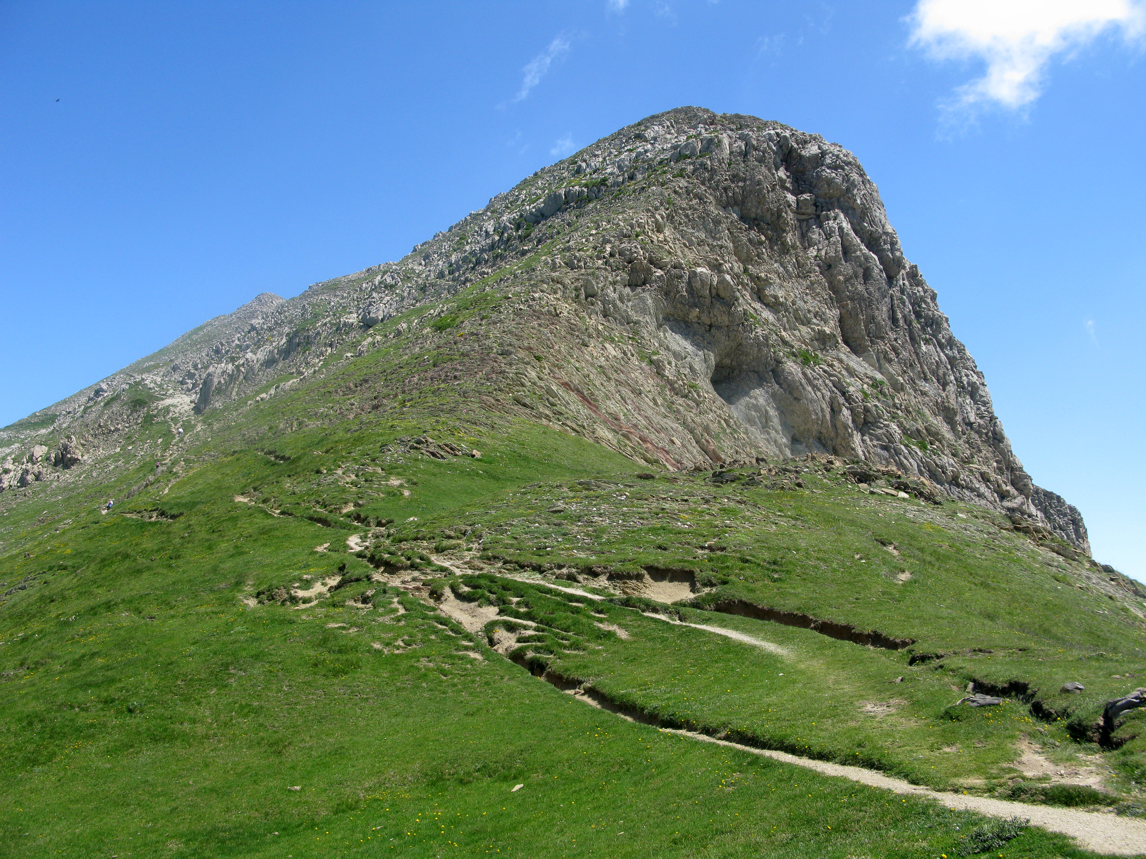 Orhi Trek 02